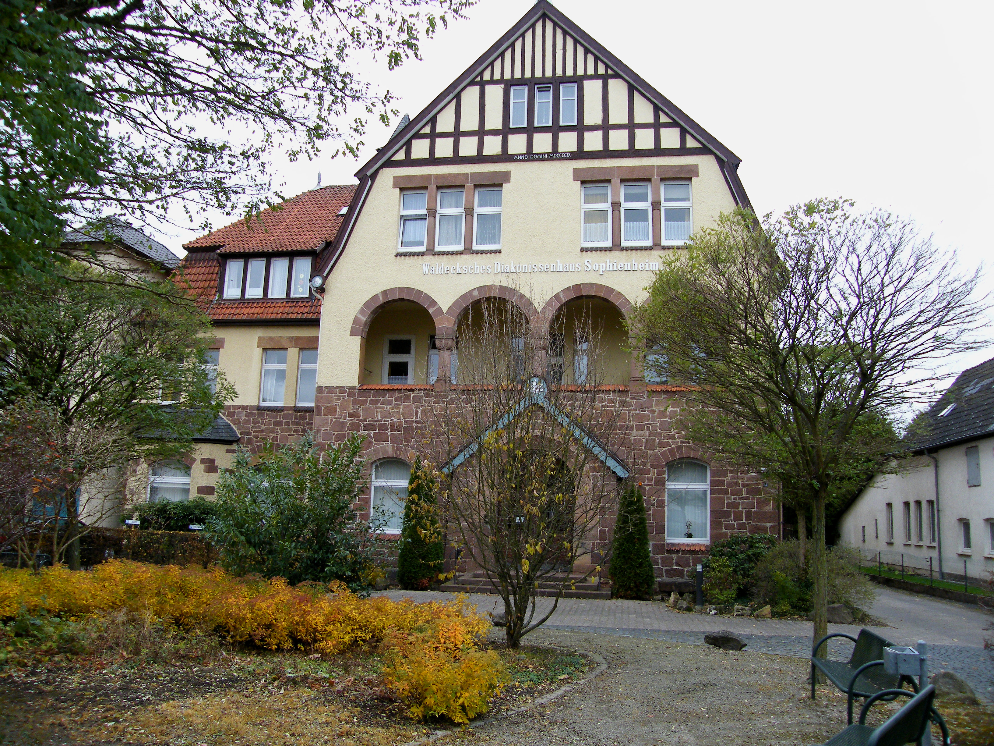 Waldecksches Diakonissenheim Sophienheim erbaut 1893, Bad Arolsen Helenenstraße